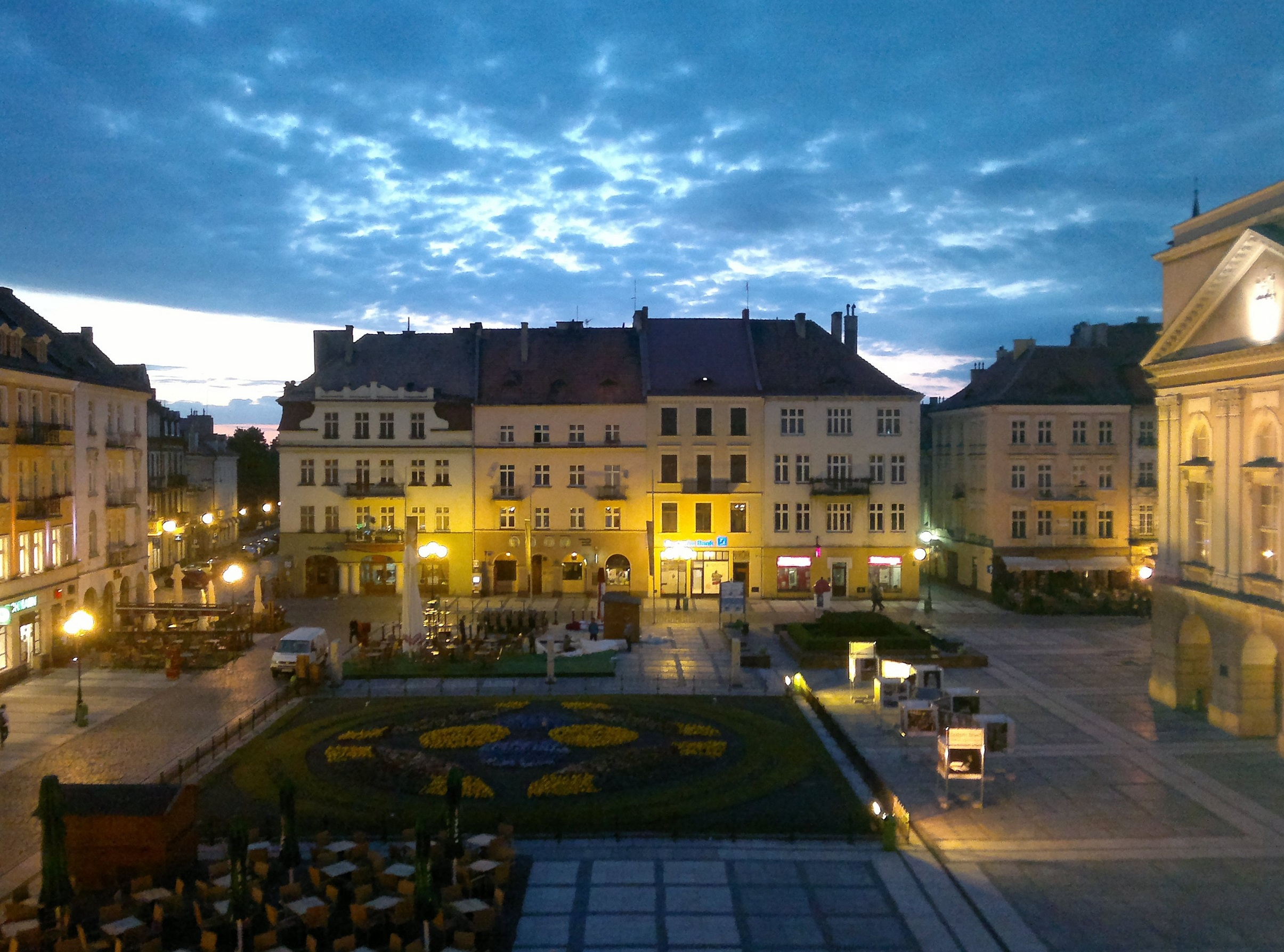 Kalisz, ratusz, 1920-27